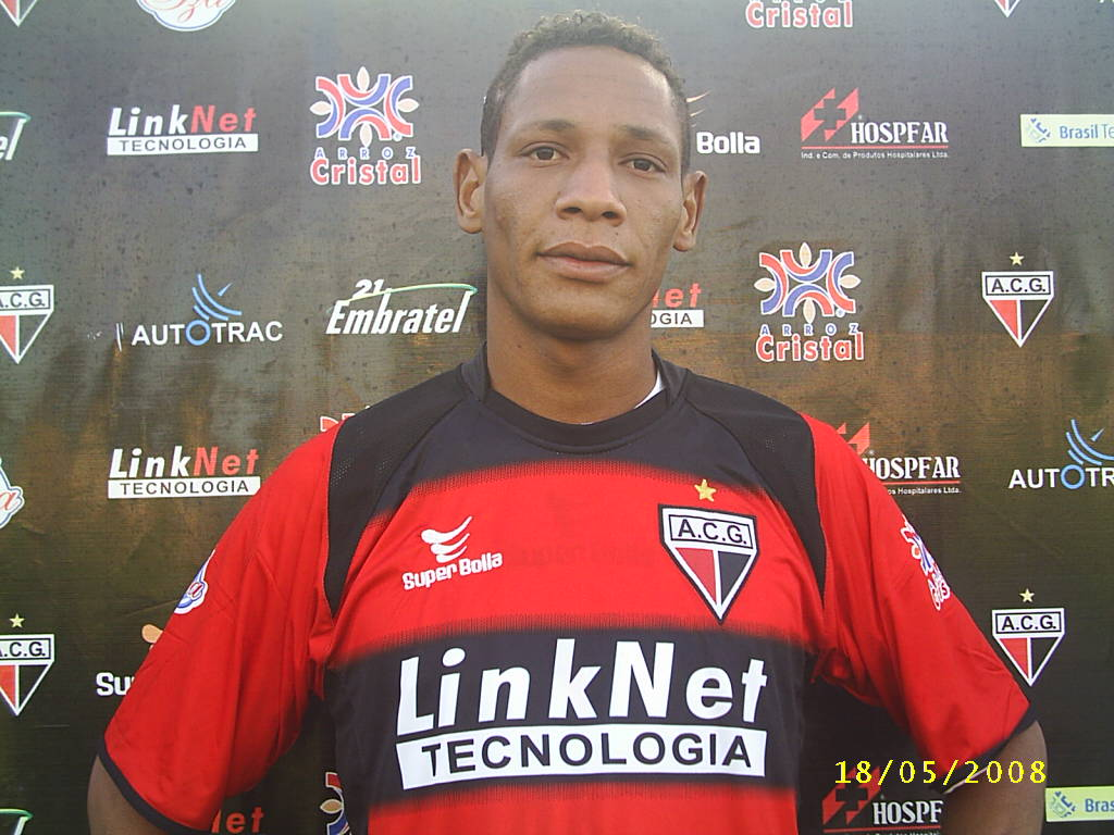 Nome: Marcos Apelido: Marcão Idade: 22 anos Posição: Atacante Altura: 1,90m Peso: 78kg Clube Anterior: Ipitanga (BA)